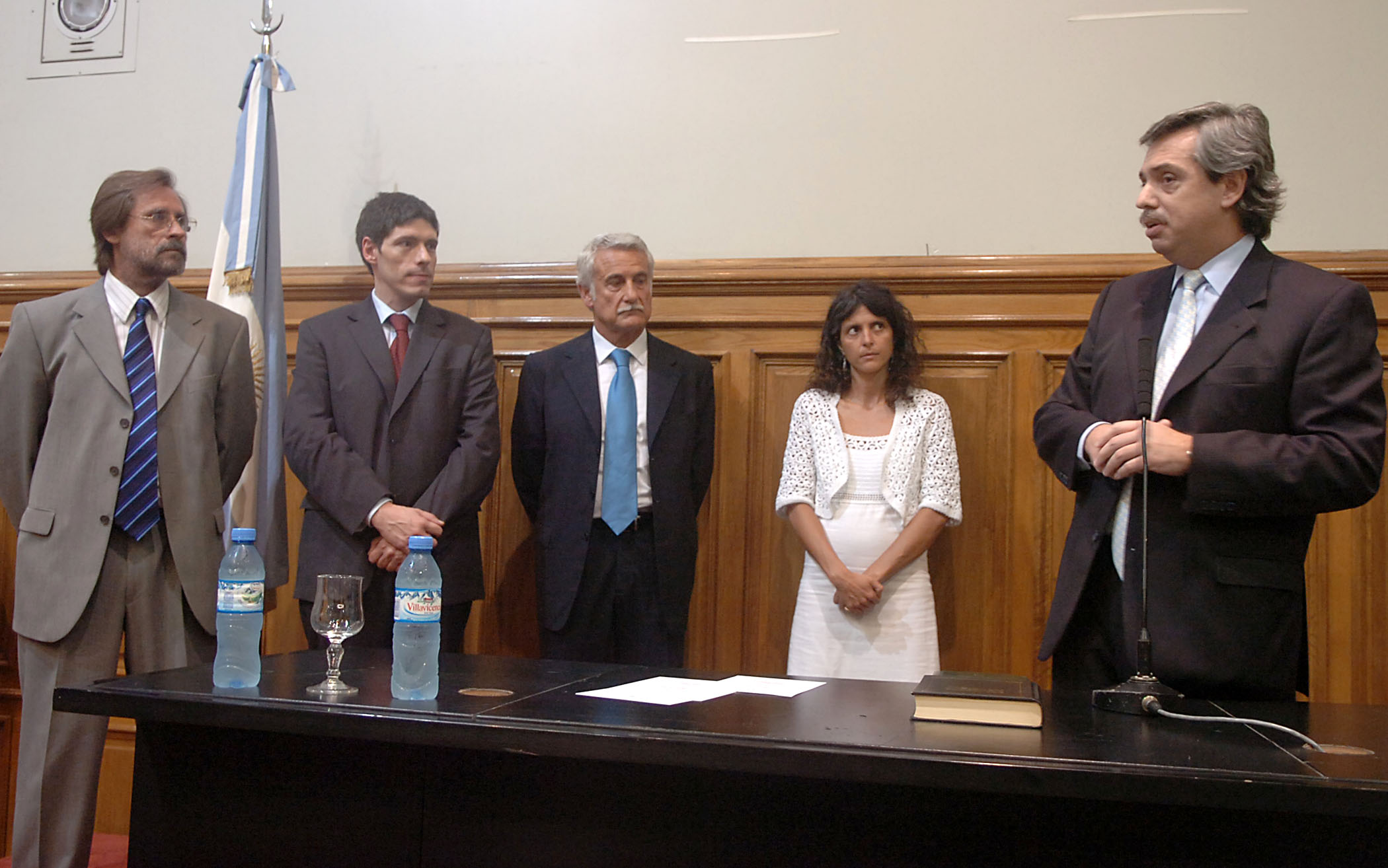 El jefe de Gabinete, Alberto Fernández tomó juramento a los secretarios de Evaluación Presupuestaria, Carlos Fernández; de la Gestión Pública, Juan Manuel Abal Medina; de Medios de Comunicación, Enrique Albistur; y de Ambiente y Desarrollo Sustentable, Romina Picolotti.